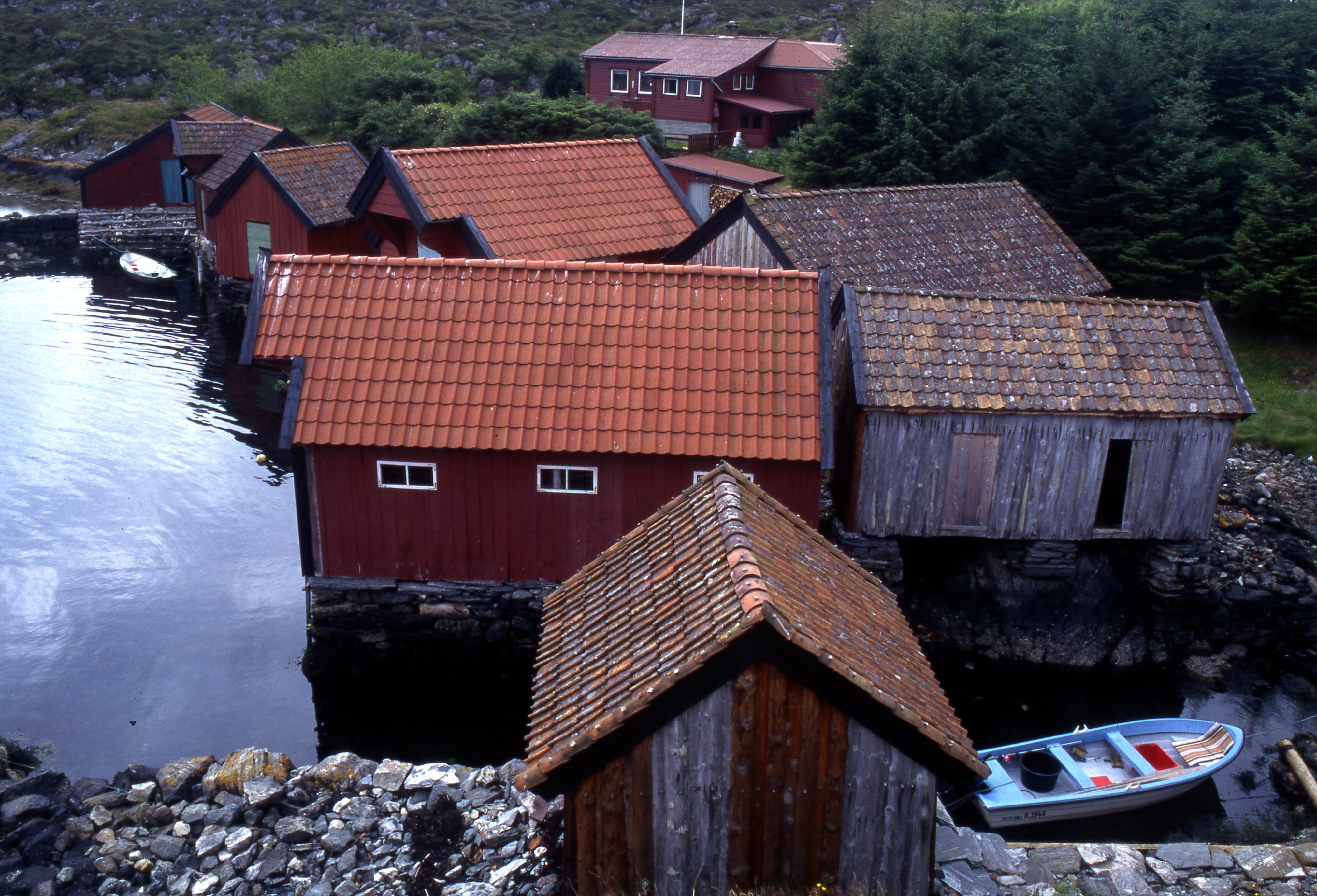 Sjøhus på Krossøy fotografert 1992